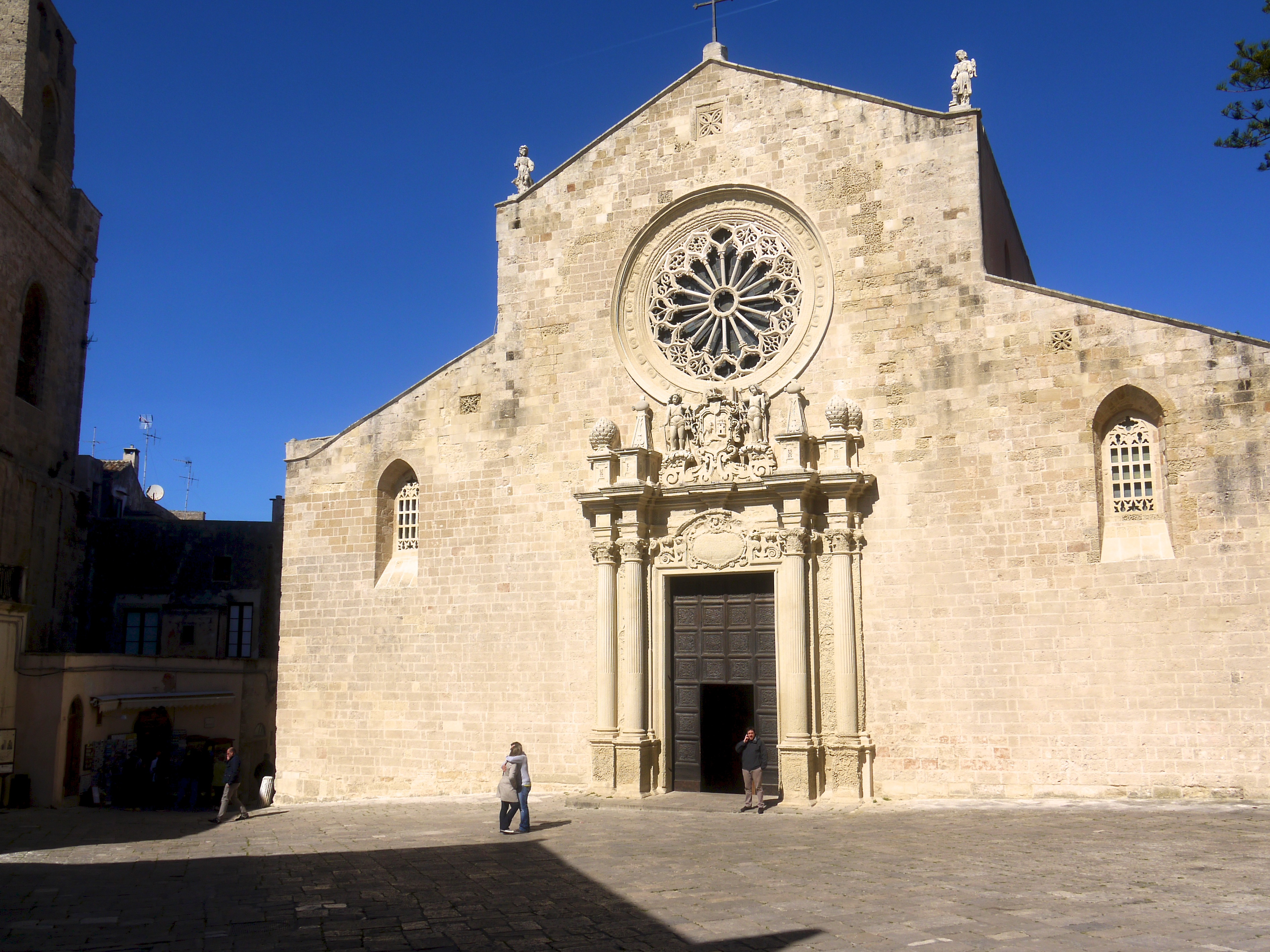 Otranto, Kathedrale, Vorderfront